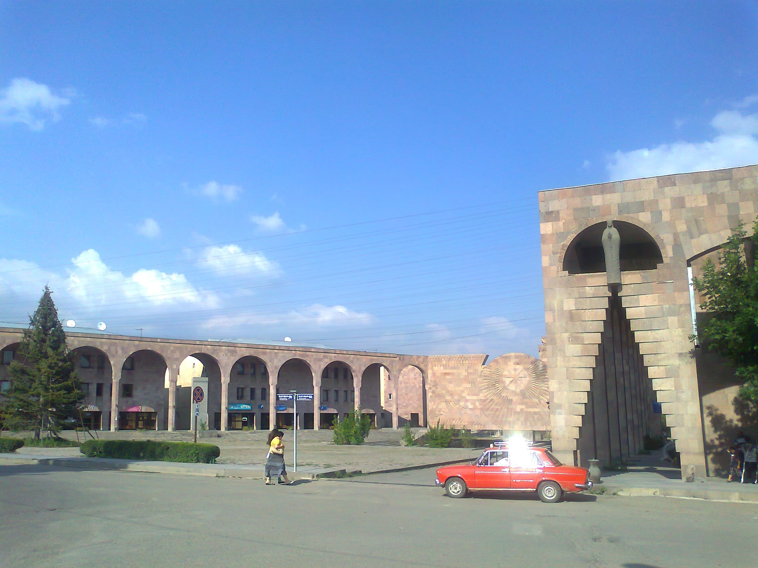 Սպիտակի հրապարակ